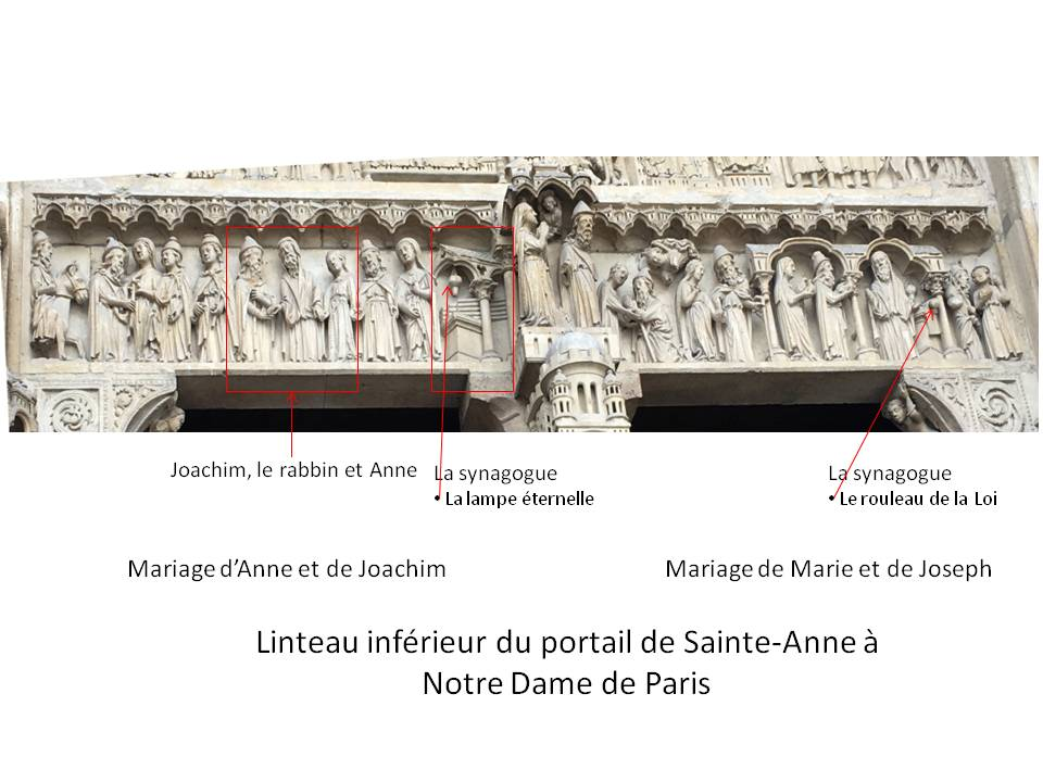 Linteau inférieur du portail de Sainte-Anne sur la façade occidentale de la cathédrale Notre-Dame de Paris avec explications quant à la représentation des Juifs